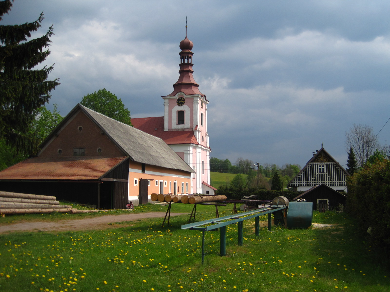 Kostel sv. Mikuláše (Dobřany), střed obce, Dobřany (okres Rychnov nad Kněžnou).